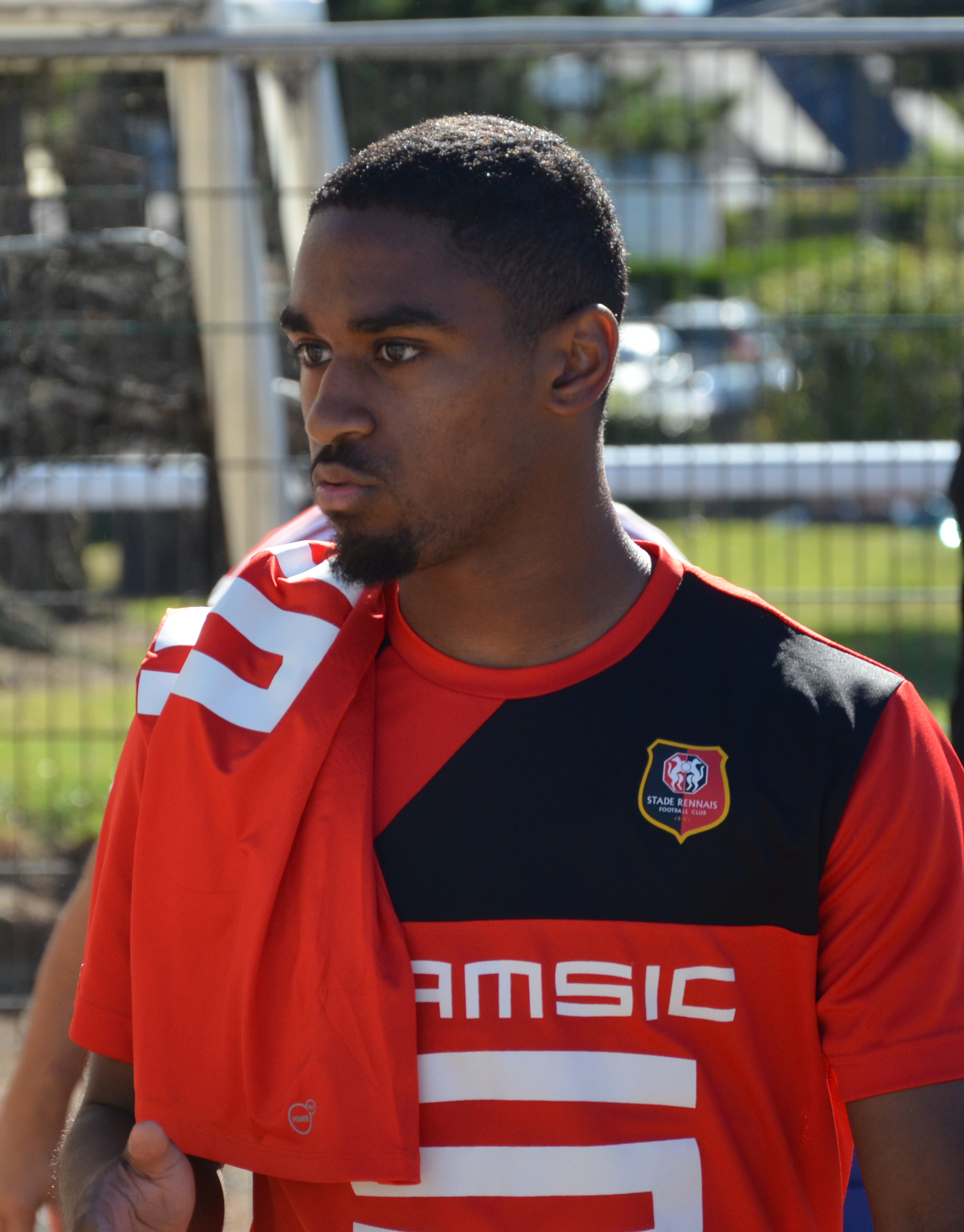 Photographie prise lors du match opposant le Stade rennais à l'USM Alger en match amical au stade Paul-Audrin de Dinard le 16 juillet 2016. Ici, Wesley Saïd.